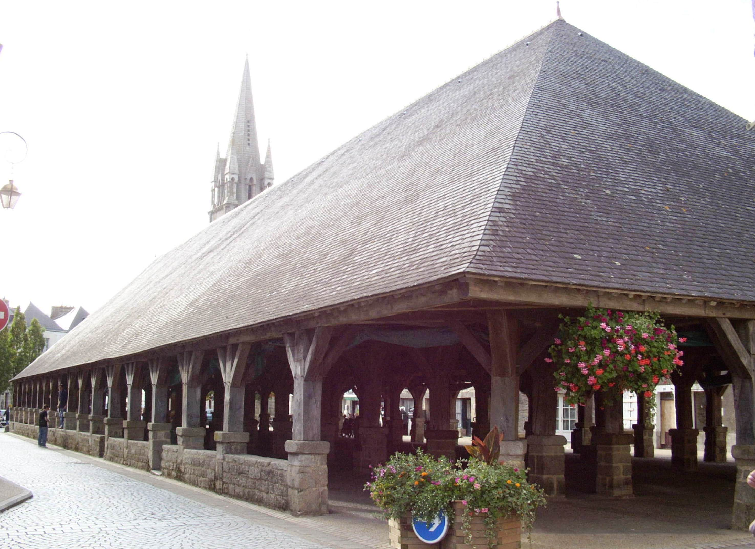 Markthalle des 16. Jh. in Questembert, Bretagne